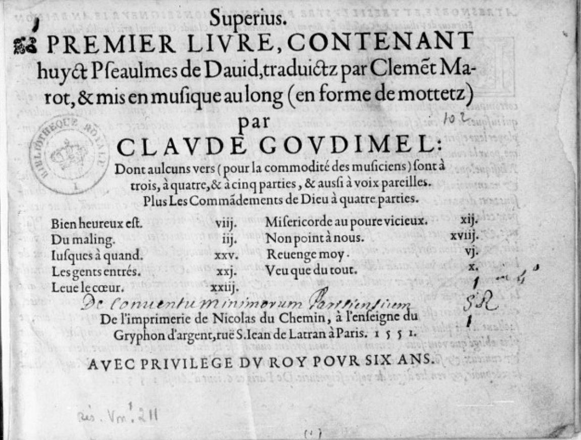 Tite page of Goudimel's Premier livre de psaumes (Paris, 1551).